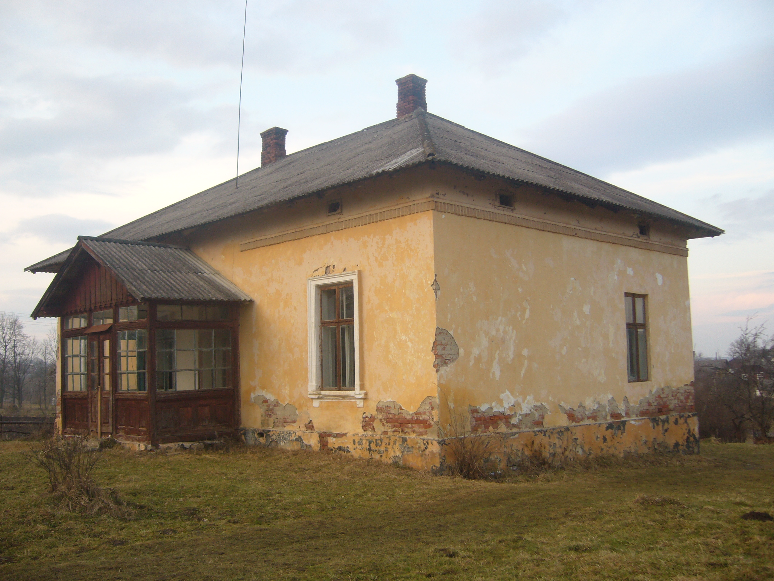 школа